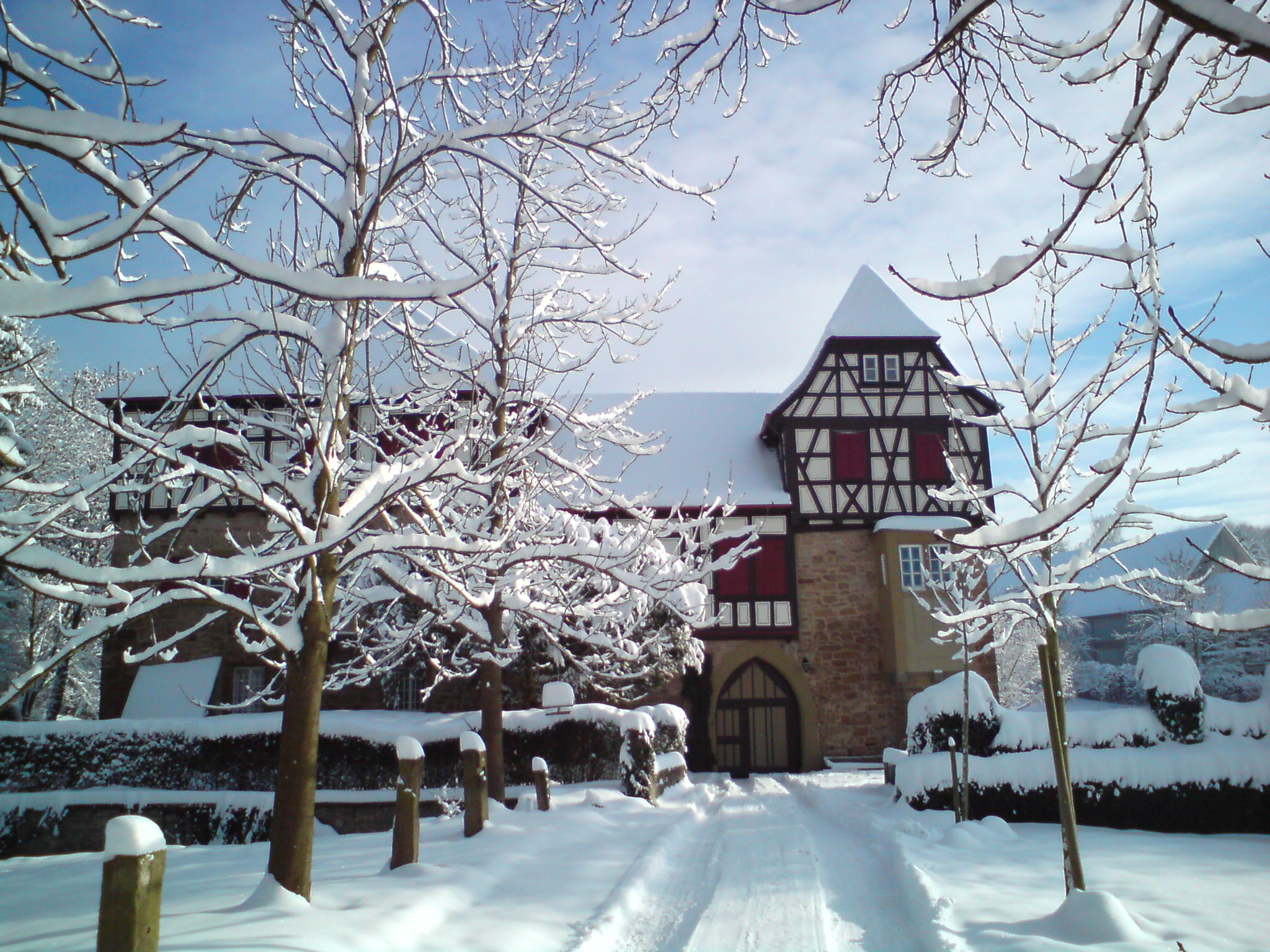 Wasserschloss Kürnbach aus dem 11. Jahrhundert